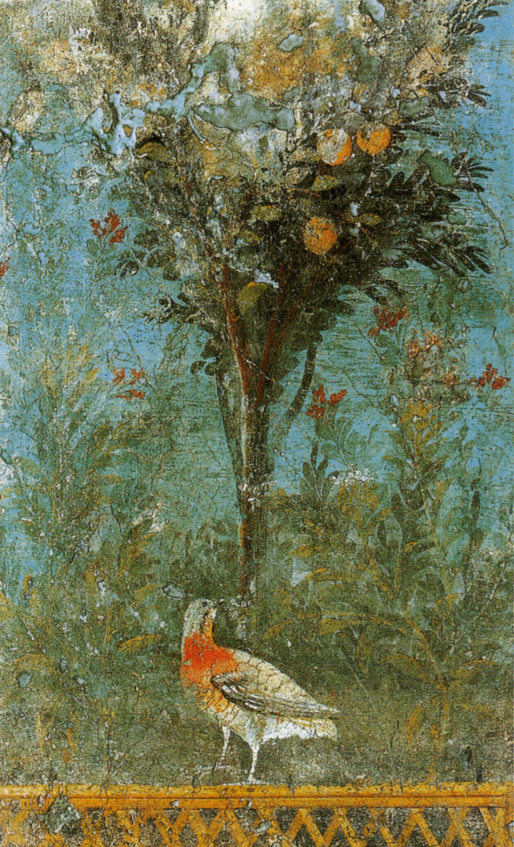 Giardino, affresco di III stile pompeiano (cm 12 x 75) proveniente da Pompei, oggi al Museo Archeologico Nazionale di Napoli (inv. nr. 9719).